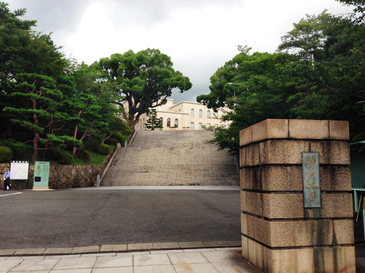 神戸大学六甲台正門 正門前